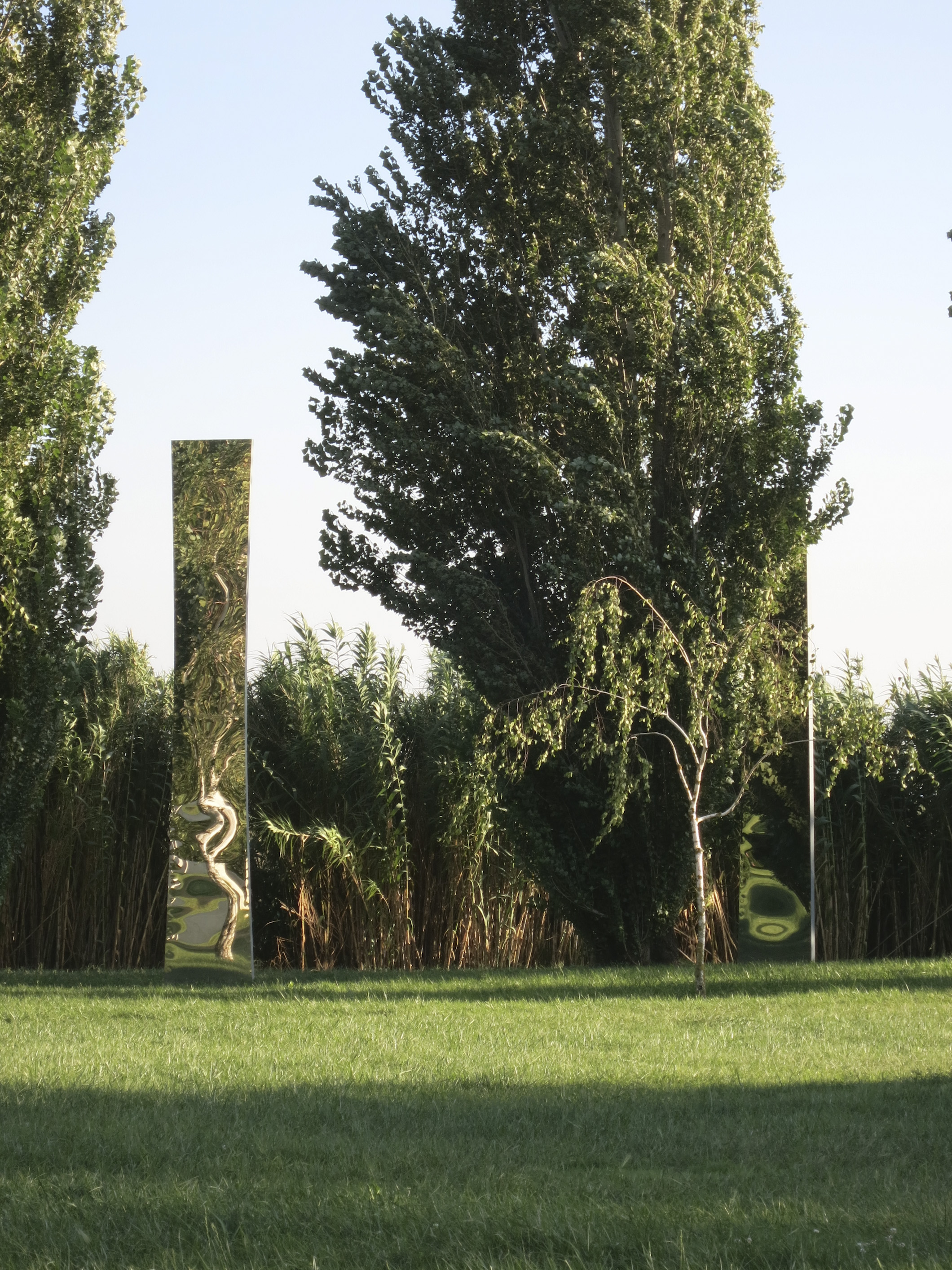 José Pedro Croft, sem título, 2012, ferro e aço polido, 600 x 100 cm (4 elementos); Almourol, Parque de Escultura Contemporânea, Vila Nova da Barquinha